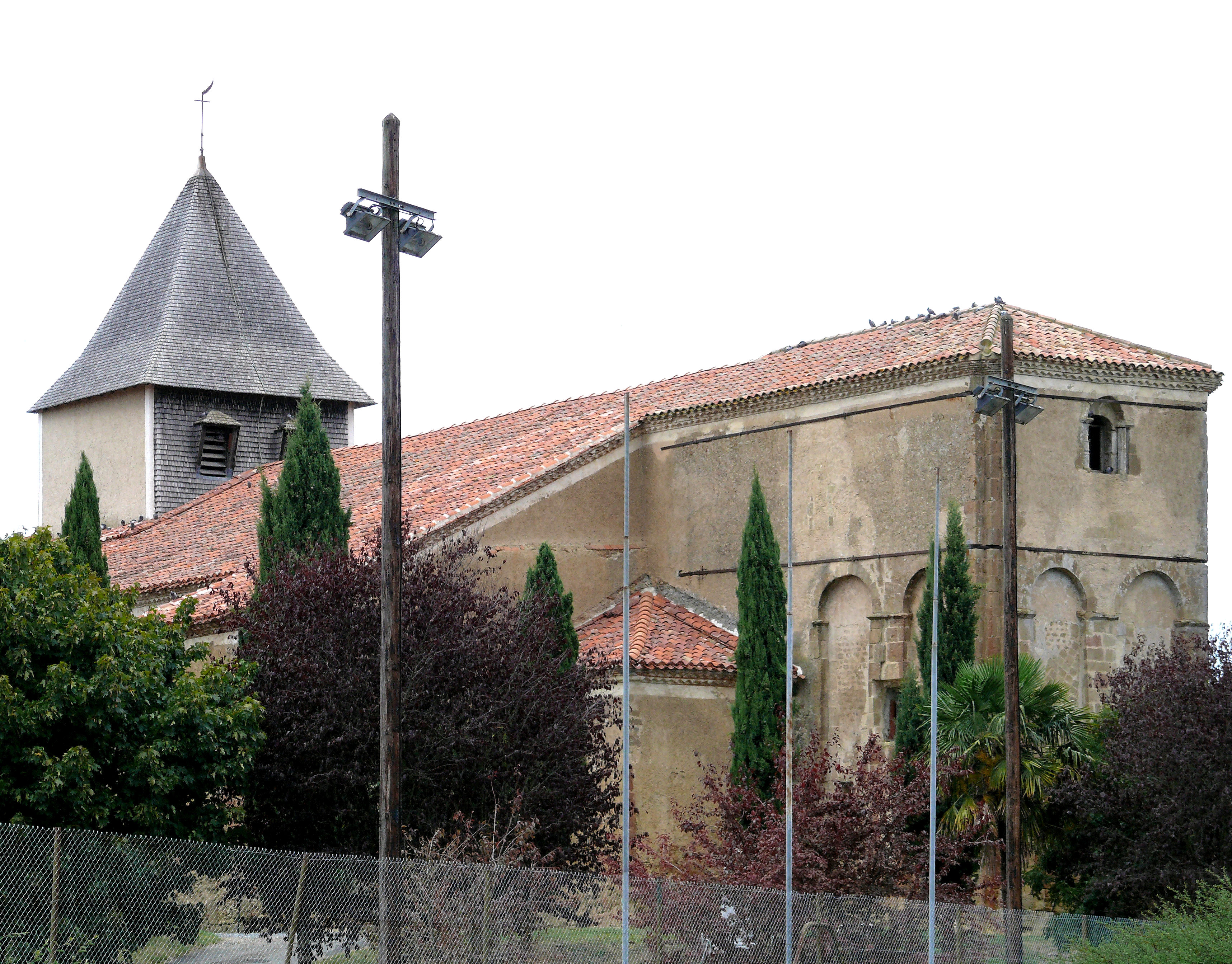 Peyrusse-Grande - Eglise Saint-Mamet - Ensemble